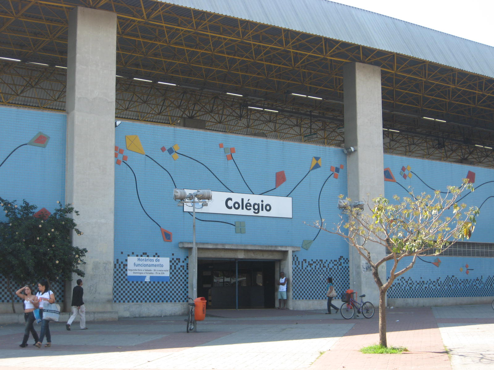 Vista da estação de metrô de Colégio, na cidade do Rio de Janeiro.